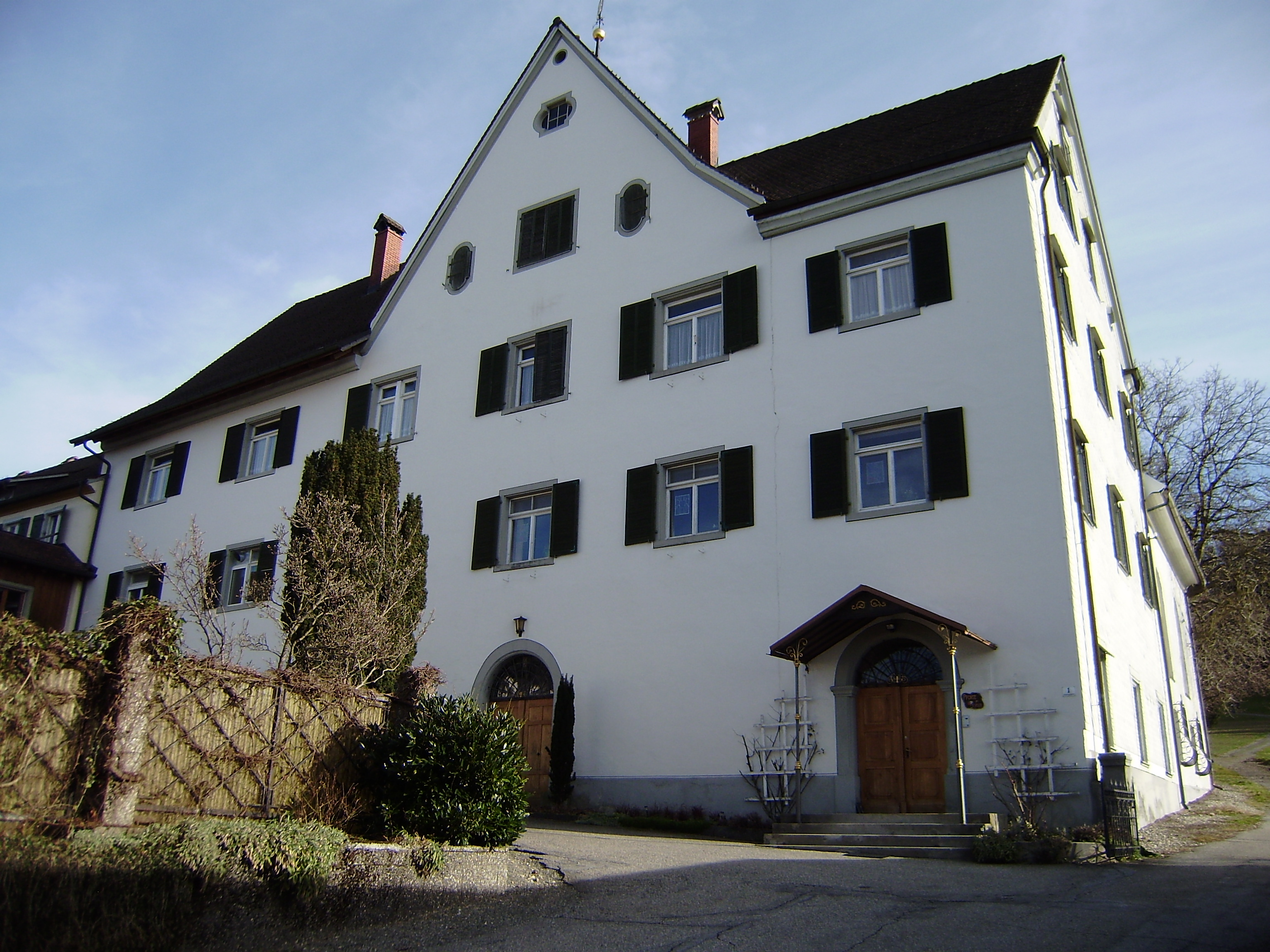 Zisterzienserinnenabtei Mariastern in Hohenweiler, Vorarlberg, Austria, ehemaliges Schlossgebäude Gwiggen von Westen